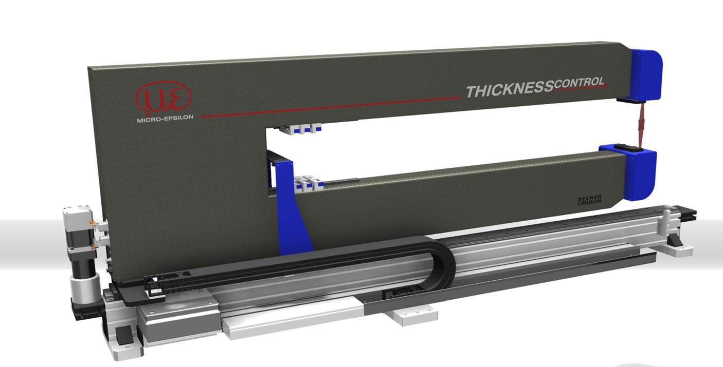 C-Rahmen auf Servoachse mit Laserlinien (Verkippungskompensation) und integrierter vollautomatischer Kalibrationseinrichtung (Temperaturkompensation)